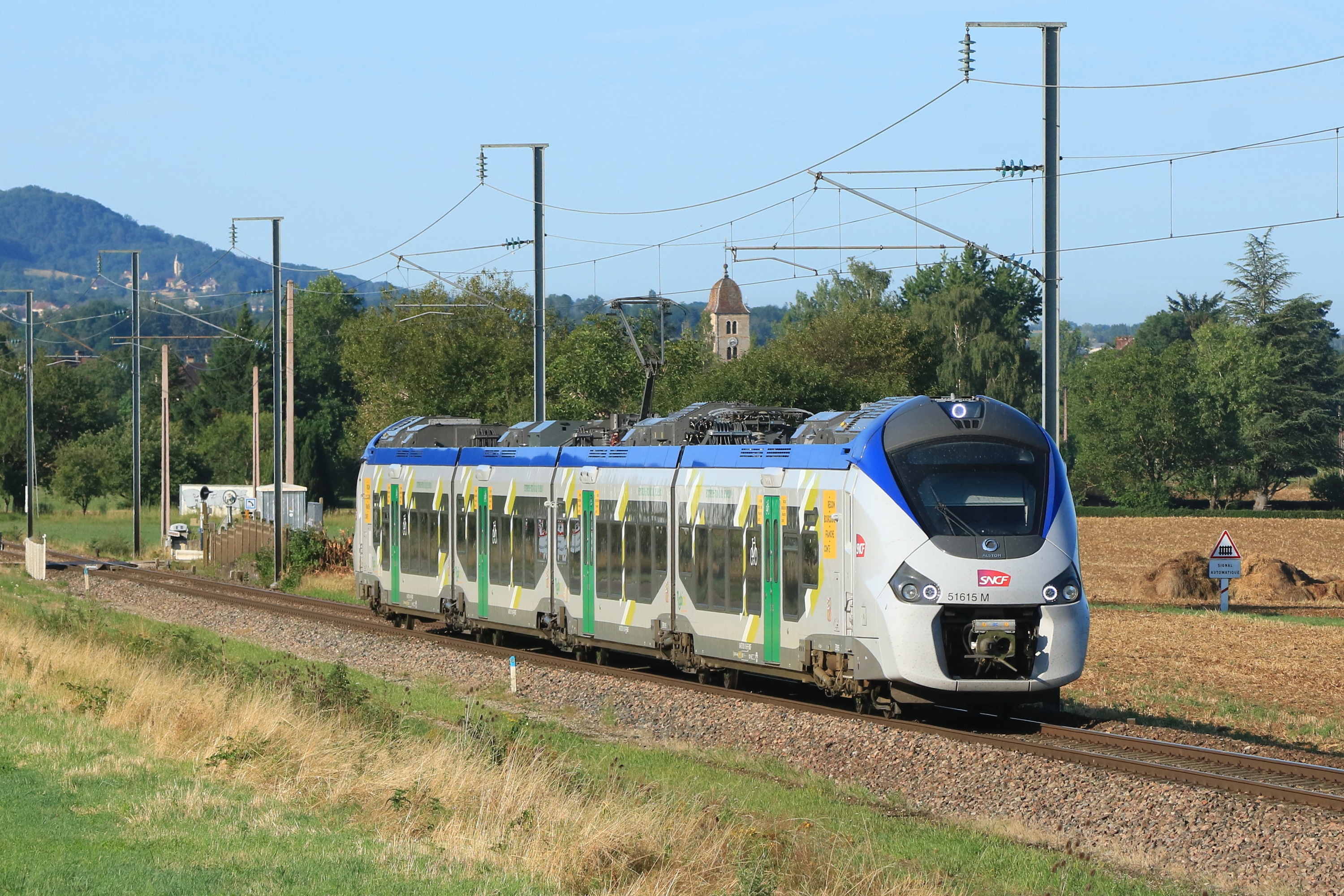 Le TER 895850 (Lyon - Belfort) assuré par la Z 51615 en livrée Bourgogne-Franche-Comté approche de Lons-le-Saunier.